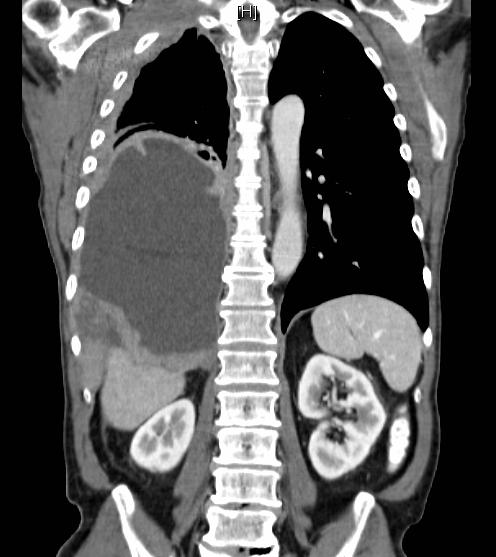 Malignant Mesothelioma, CT scan coronal